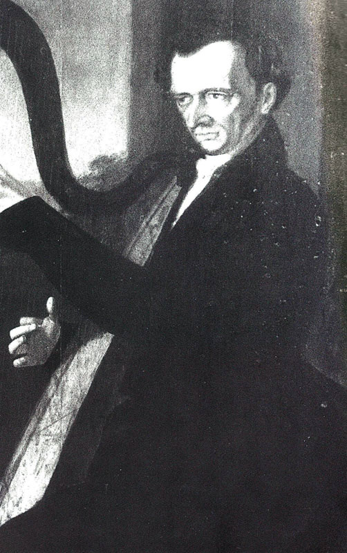 Jan Křtitel Krumpholtz (1742 - 1790), Český harfenista a hudební skladatel.